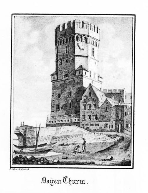 Bayenturm, Köln 19. Jahrhundert. Nordostansicht